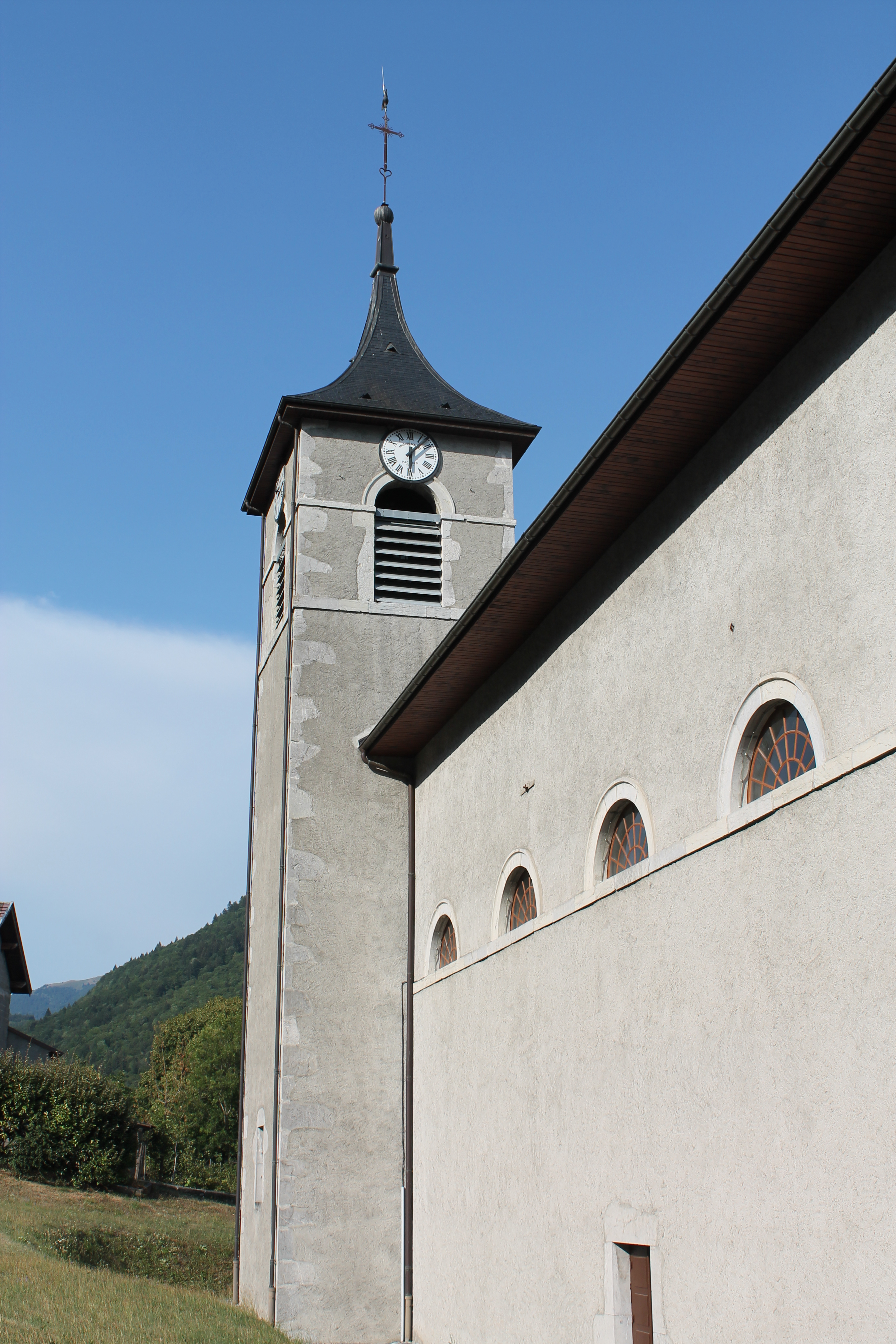 Clocher de l'église Saint-Ferréol (août 2018).